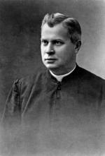 Marceli Godlewski